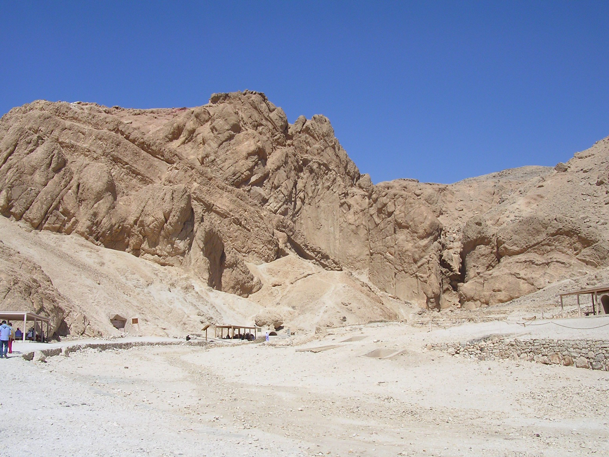 A Királynék Völgye (Egyiptom, Théba, nyugati part, Királynék Völgye)